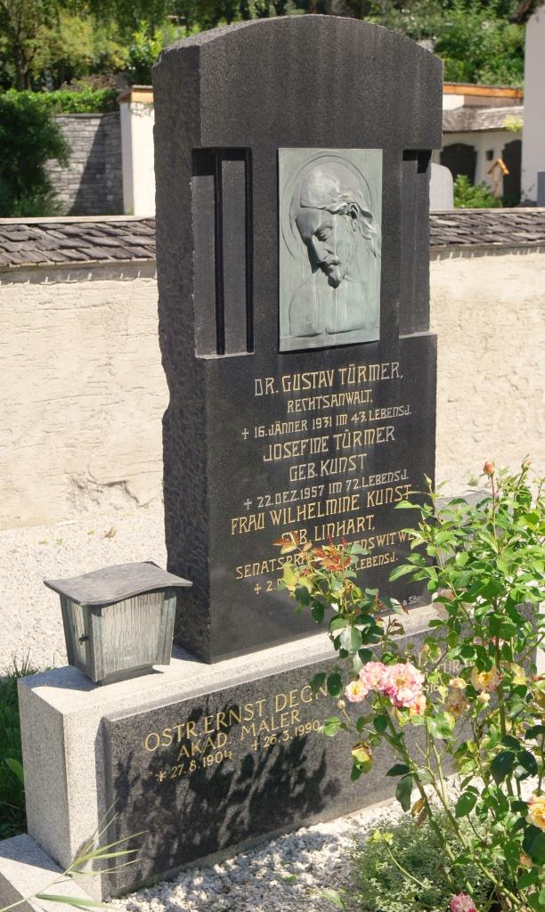 Grab des Malers Ernst Degn (1904-1990) auf dem Neuen Friedhof Mühlau, Innsbruck